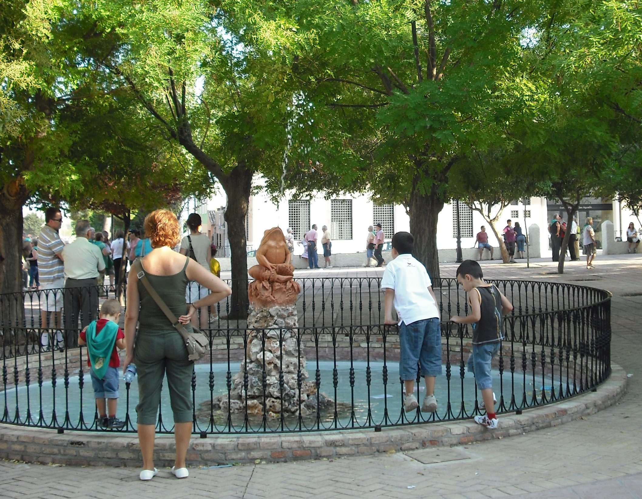 Escultura de la Rana en la explanada del Santuario de Nuestra Señora de las Virtudes de Villena, pocos días después de su restauración. La foto está tomada minutos después de haber marchado la romería que da inicio a las fiestas de Moros y Cristianos.